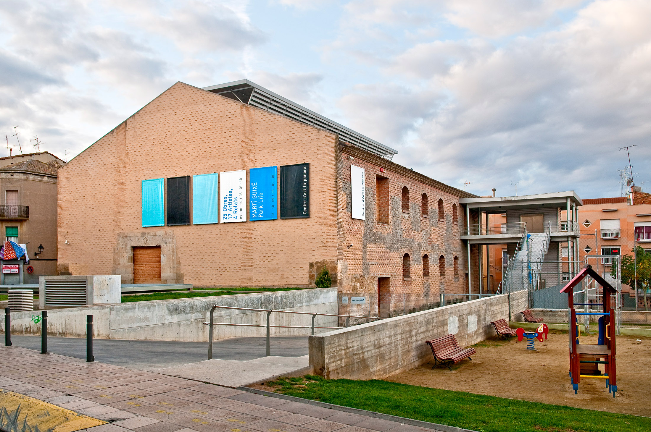 Façana del Centre d'Art la Panera de Lleida